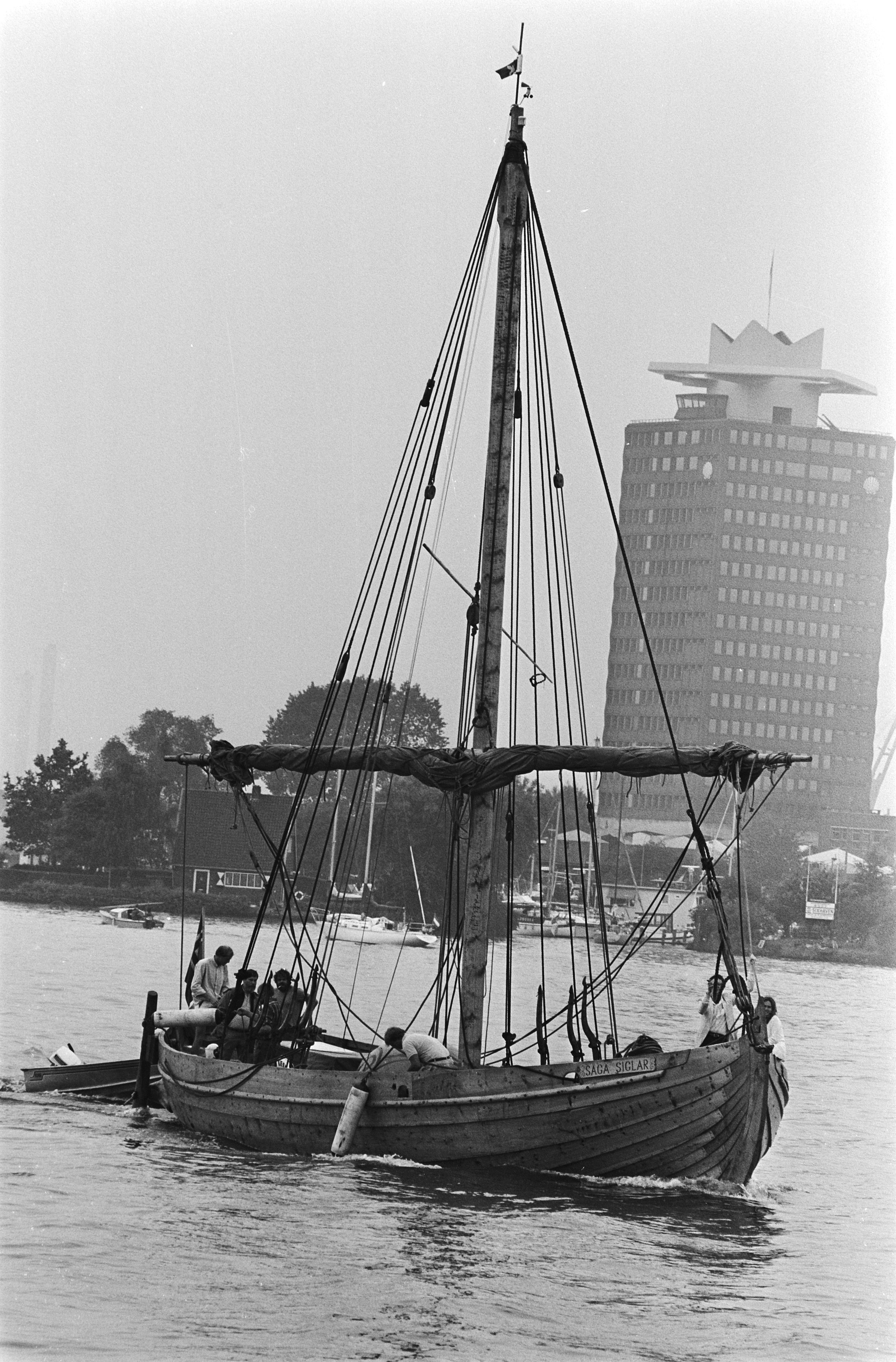 Collectie / Archief : Fotocollectie Anefo Reportage / Serie : [ onbekend ] Beschrijving : Aankomst van het vikingschip Saga Siglar in Amsterdam Datum : 24 juli 1983 Locatie : Amsterdam, Noord-Holland Trefwoorden : zeilschepen Fotograaf : Bogaerts, Rob / Anefo Auteursrechthebbende : Nationaal Archief Materiaalsoort : Negatief (zwart/wit) Nummer archiefinventaris : bekijk toegang 2.24.01.05 Bestanddeelnummer : 932-6567